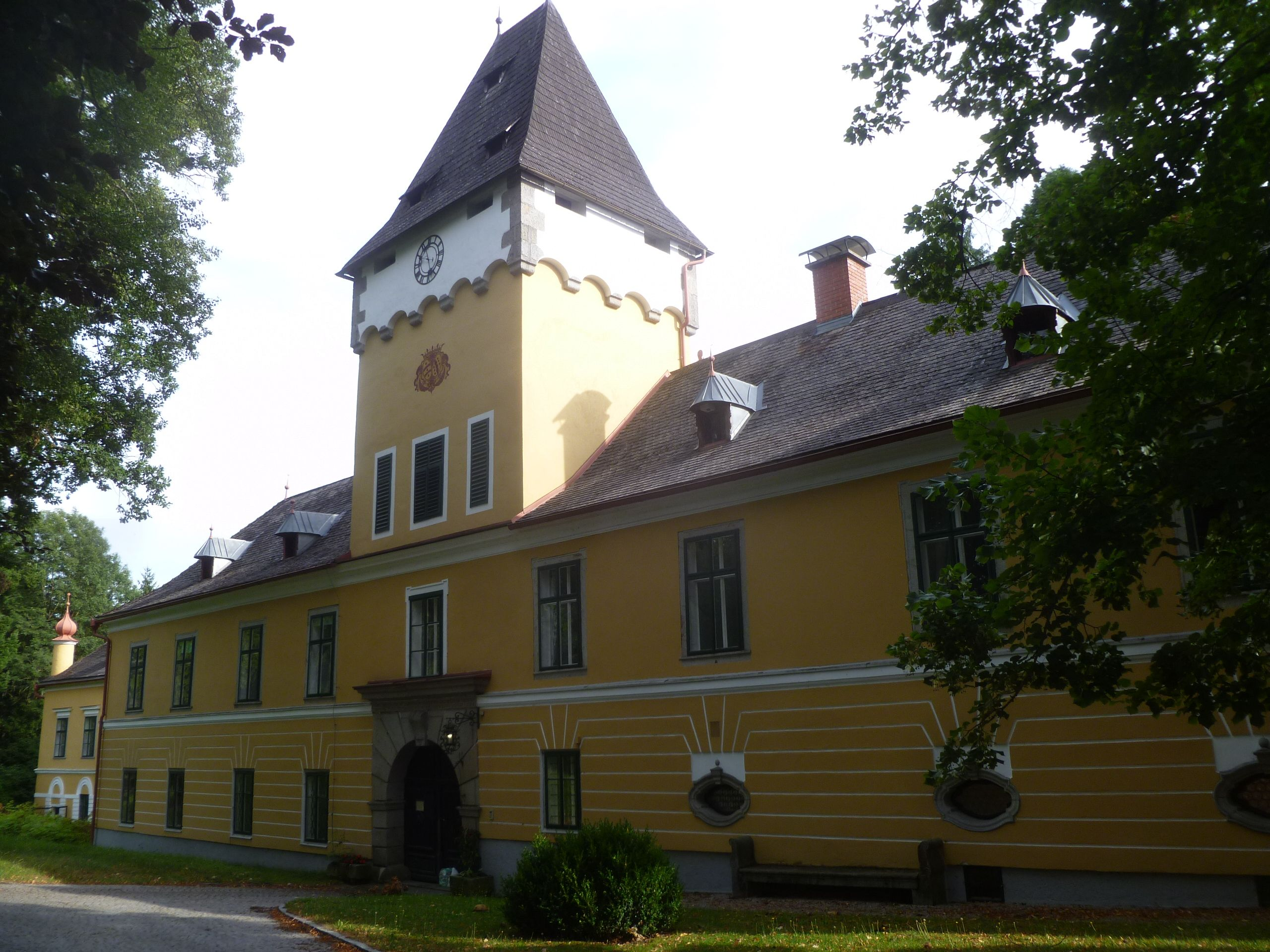 Schloss Helfenberg (Upper Austria)